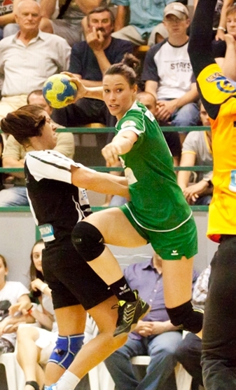 Adrienn Szarka